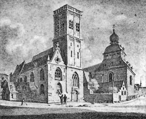 St. Jakob und St. Georg, Köln. Lithographie J. A. Wünsch um 1825/27